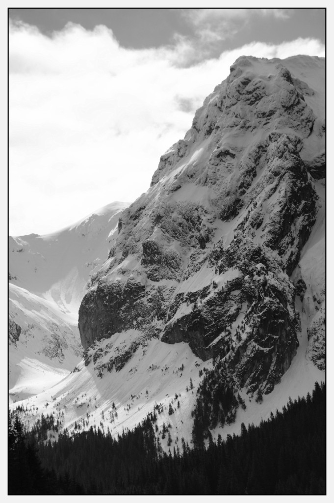 Wielka Turnia z Wielkiej Polany Małołąckiej